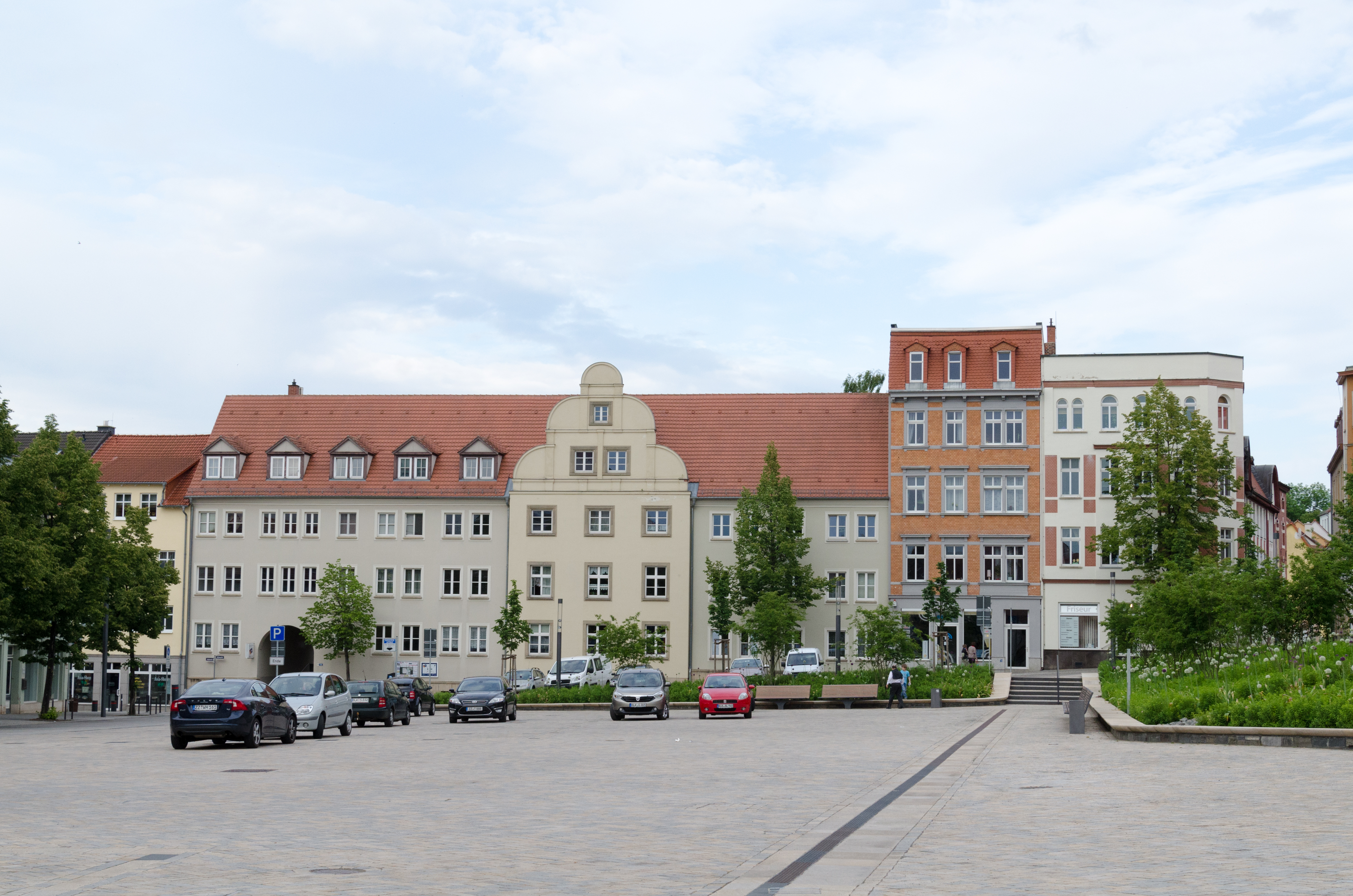 Zeitz, Altmarkt 11, 10, 9